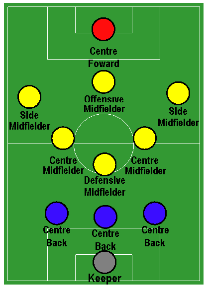 3-5-1-1 Soccer Formation